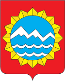 Герб Лабинского района Краснодарского края